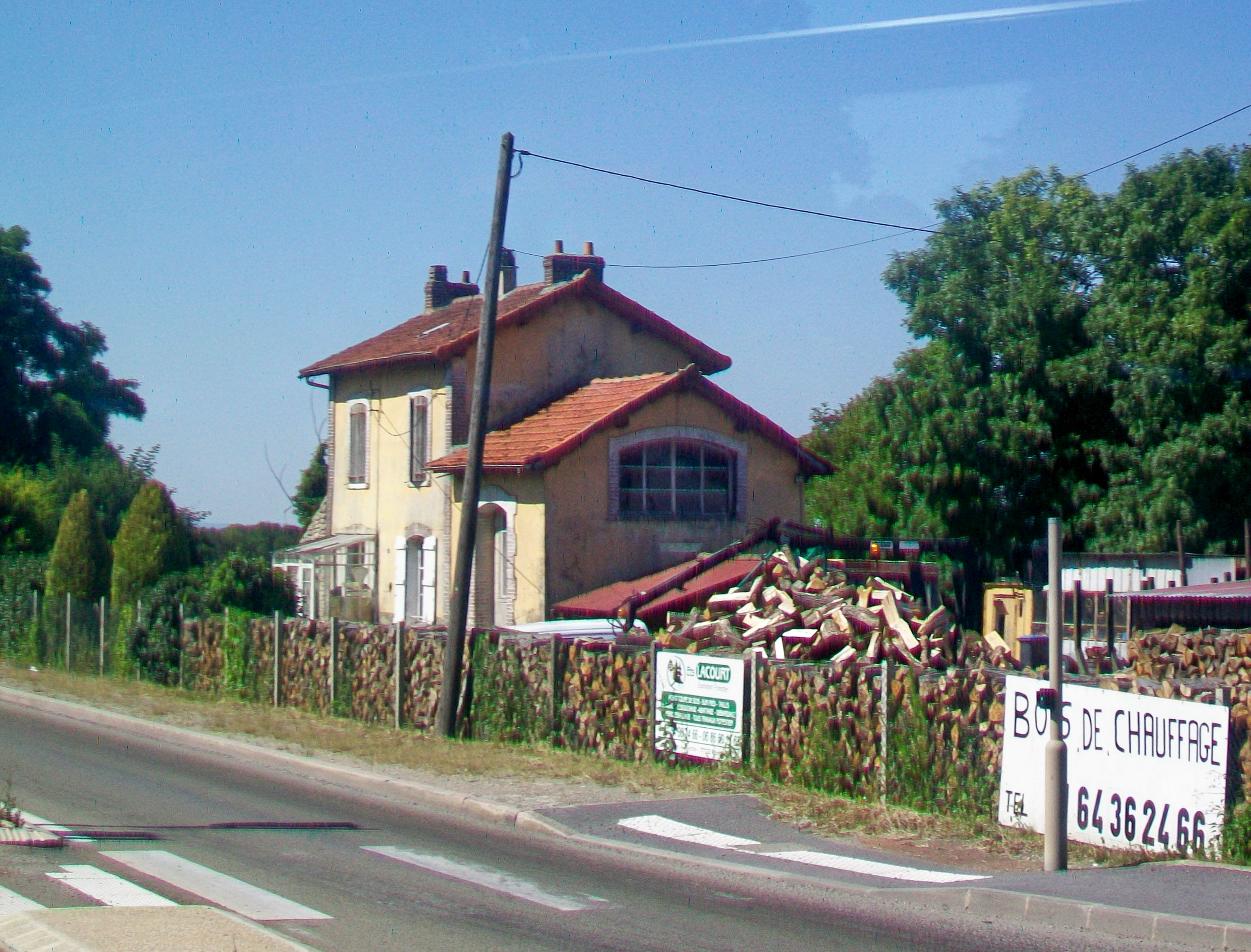 Monthyon, ancienne gare du tramway de Meaux à Dammartin, côté voies.